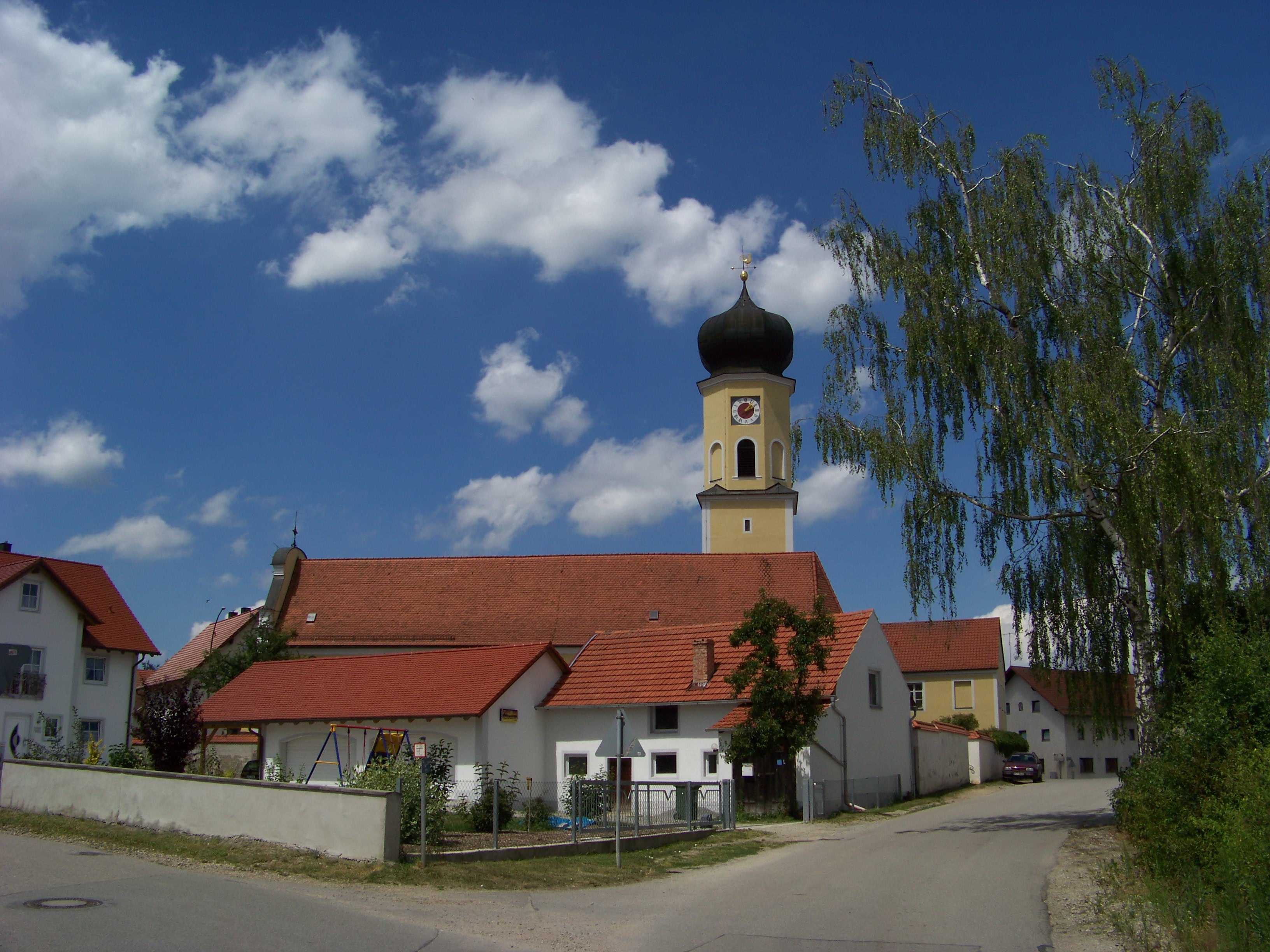 Mötzing, Kastnerstraße; Kastnerstraße 58; Laaberallee. Kath. Benefiziumskirche Maria Immaculata. Saalbau mit abgewalmtem Satteldach, Flankenturm mit Zwiebelhaube und Giebelfassade mit Vorbau und Pilastergliederung, Chor und Turm gotisch, Langhaus im Kern romanisch, Erweiterung im Barock und Ende 19. Jahrhundert in Neurenaissanceformen; mit Ausstattung. Südansicht.